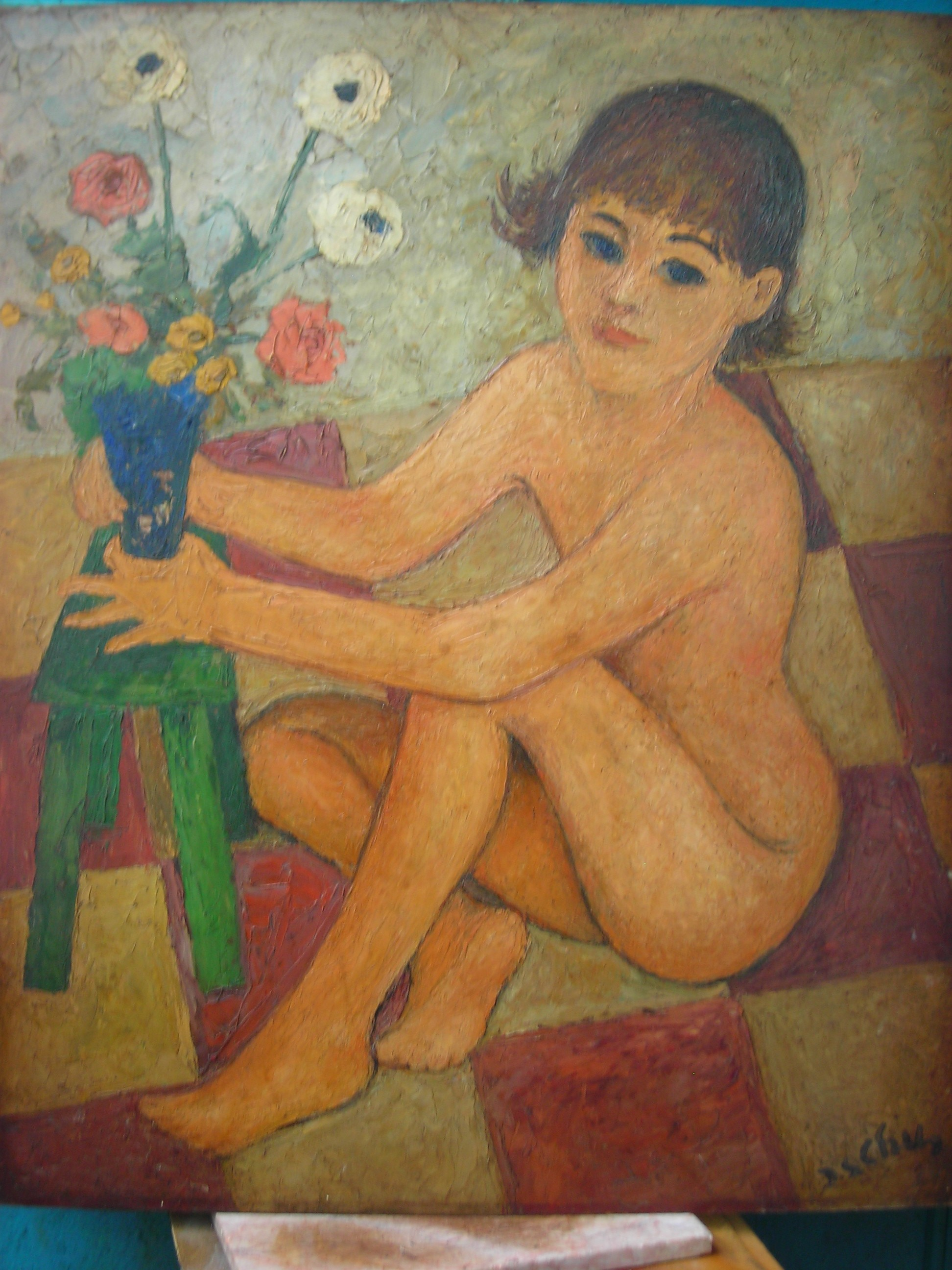 Tableau peint par mon père